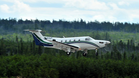 Pascan Pilatus PC-12 en vol, où?